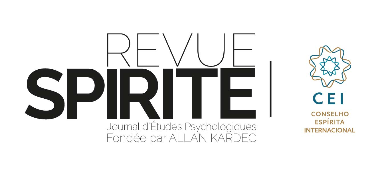 Titre de "La revue spirite" tel qu'il apparaît sur la couverture de ce magazine.